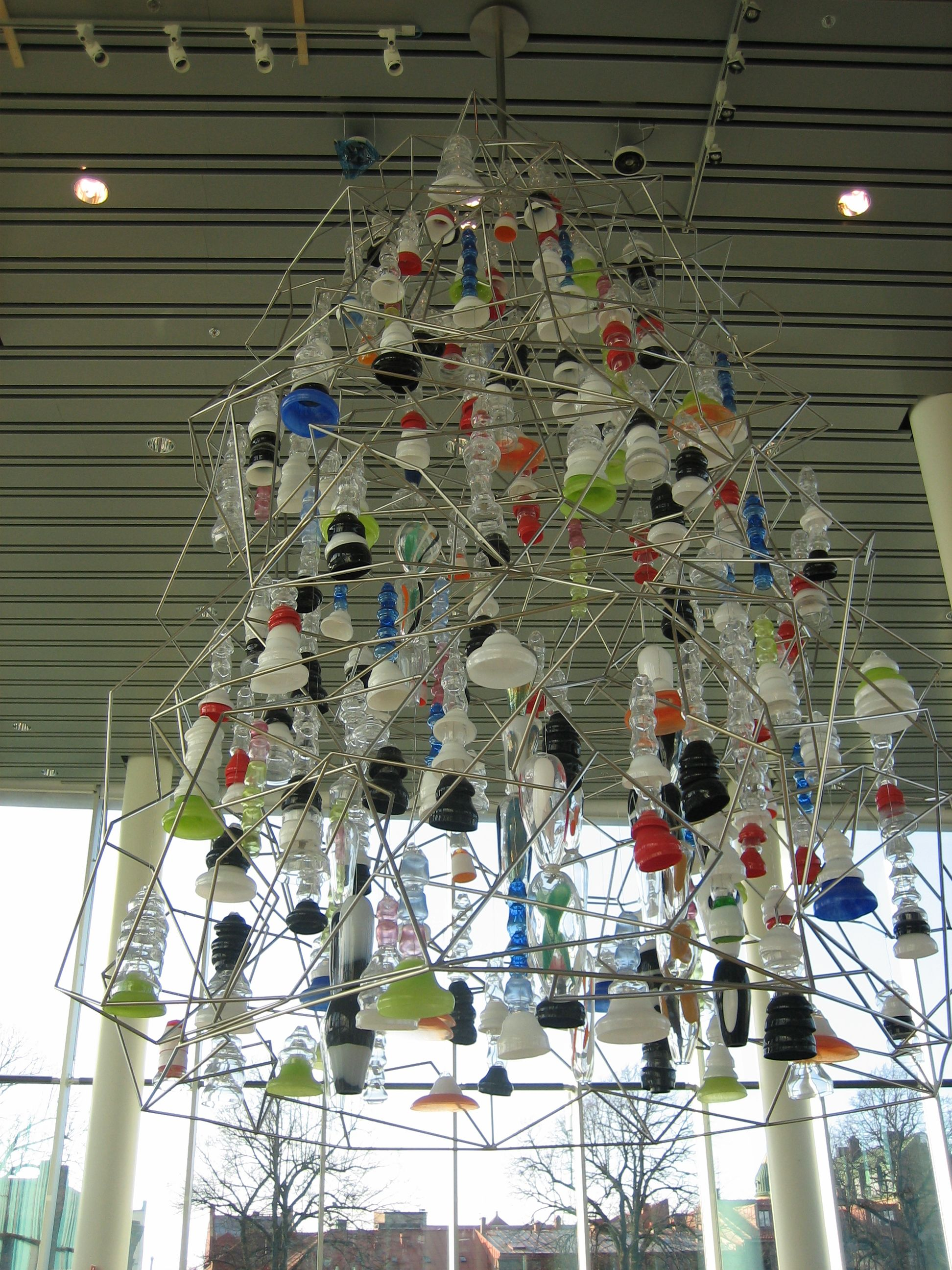 Another Thinking Bell i Halmstads Stadsbibliotek av Olav Cristopher Jenssen